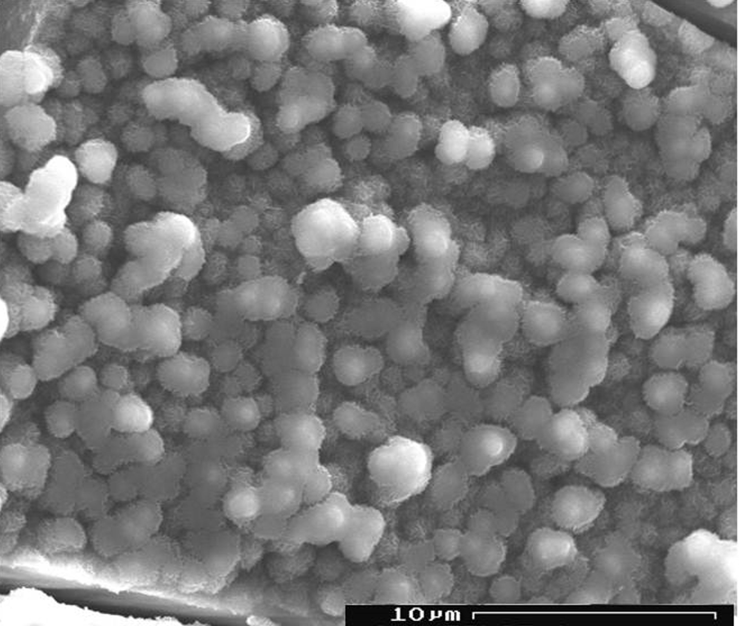 Elko-Anodenoberfläche mit aufgewachsenem Al-Hydroxid in Perlenform